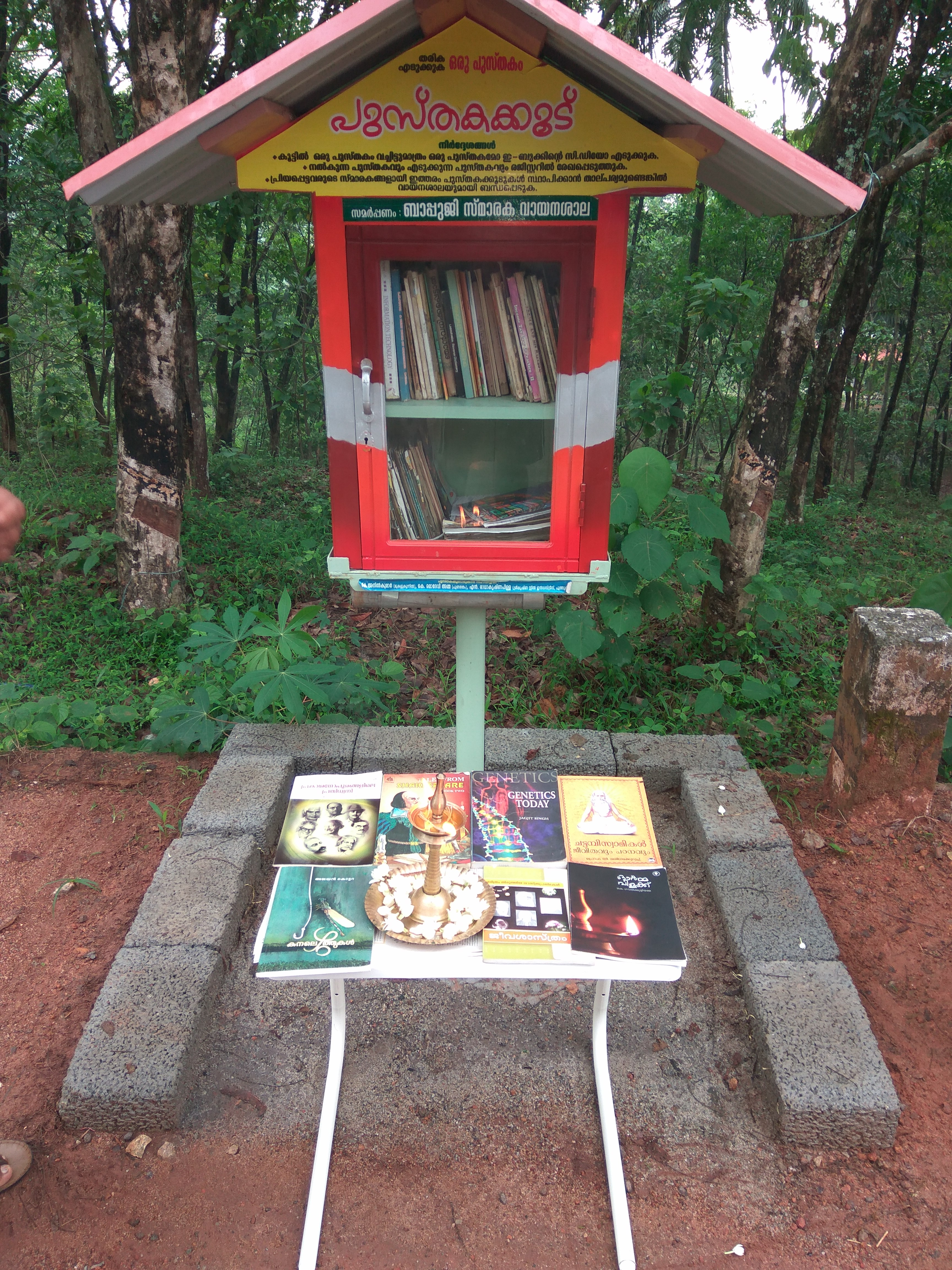 പെരുംകുളം റേഡിയോജംഗ്ഷനില് സ്ഥാപിച്ചിരിക്കുന്നു